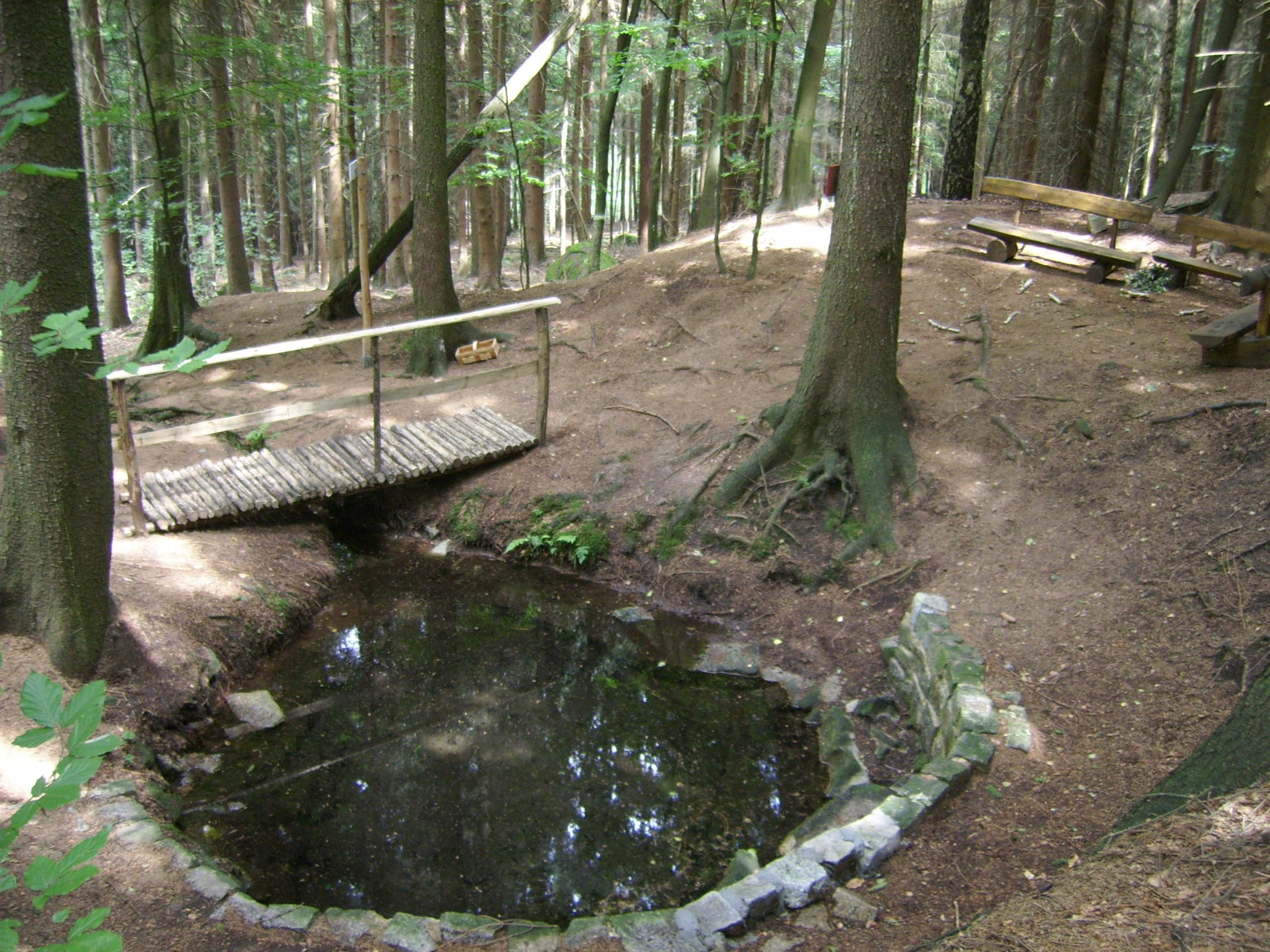 Die Quelle der Schwarzen Elster bei Burkau in Sachsen